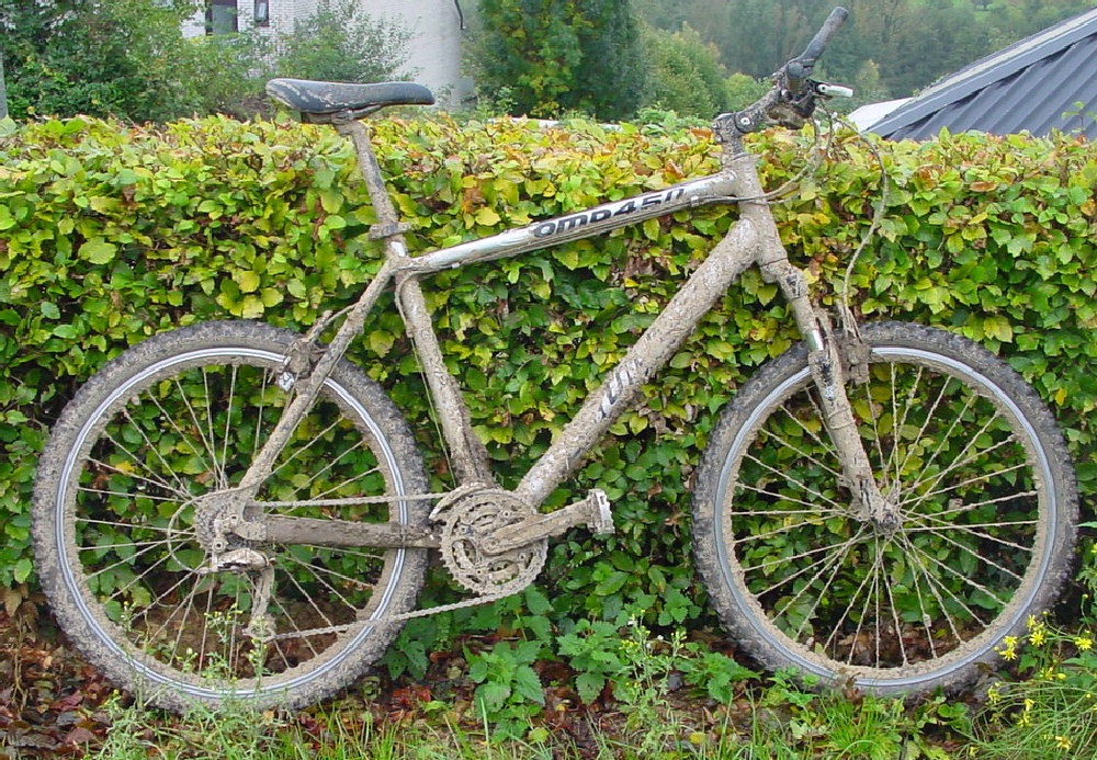 De mountainbike van Rob Ottenhof na gebruik (deze foto is genomen na de 1e Bart Brentjens mountainbike Challenge 2005 in Limburg).